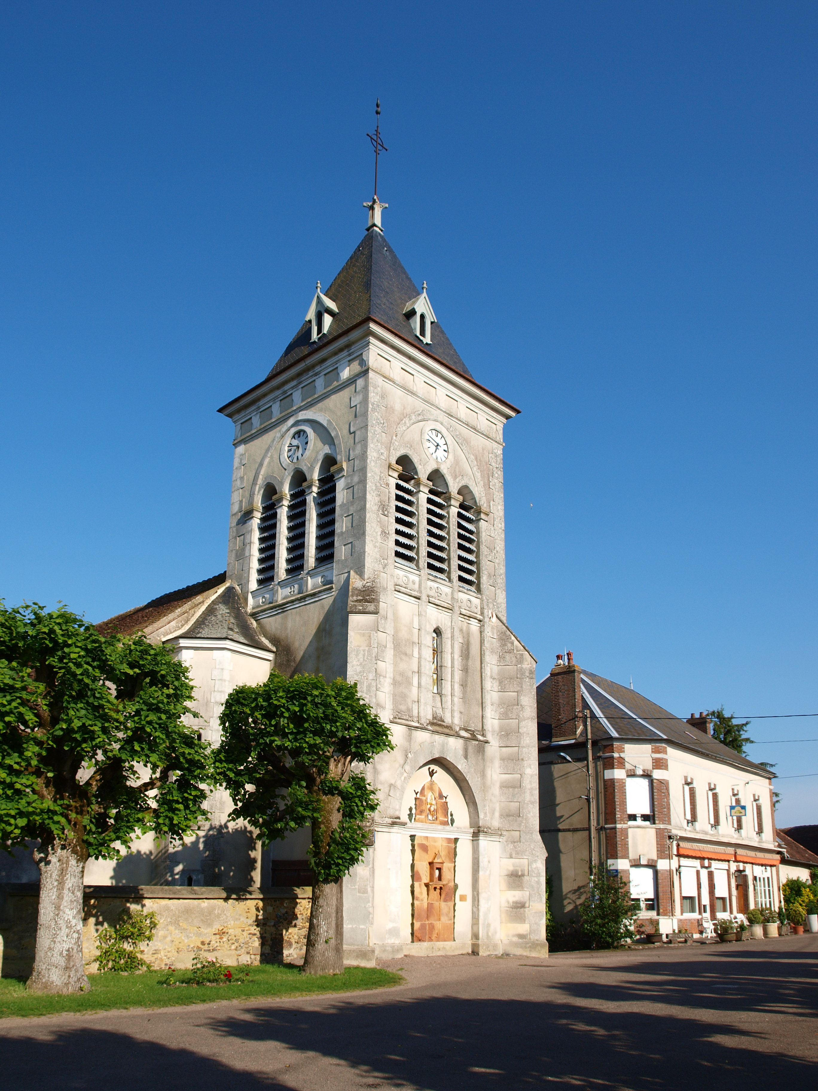 Saint-Aubin-Château-Neuf (Yonne, France)